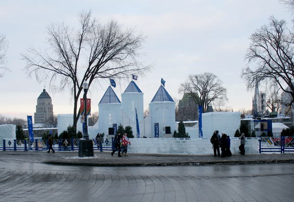 Carnaval de Québec 2011. Palais de Bonhomme. Place Loto-Québec. Place de l’Assemblée-Nationale. Ville de Québec, Québec, Canada.